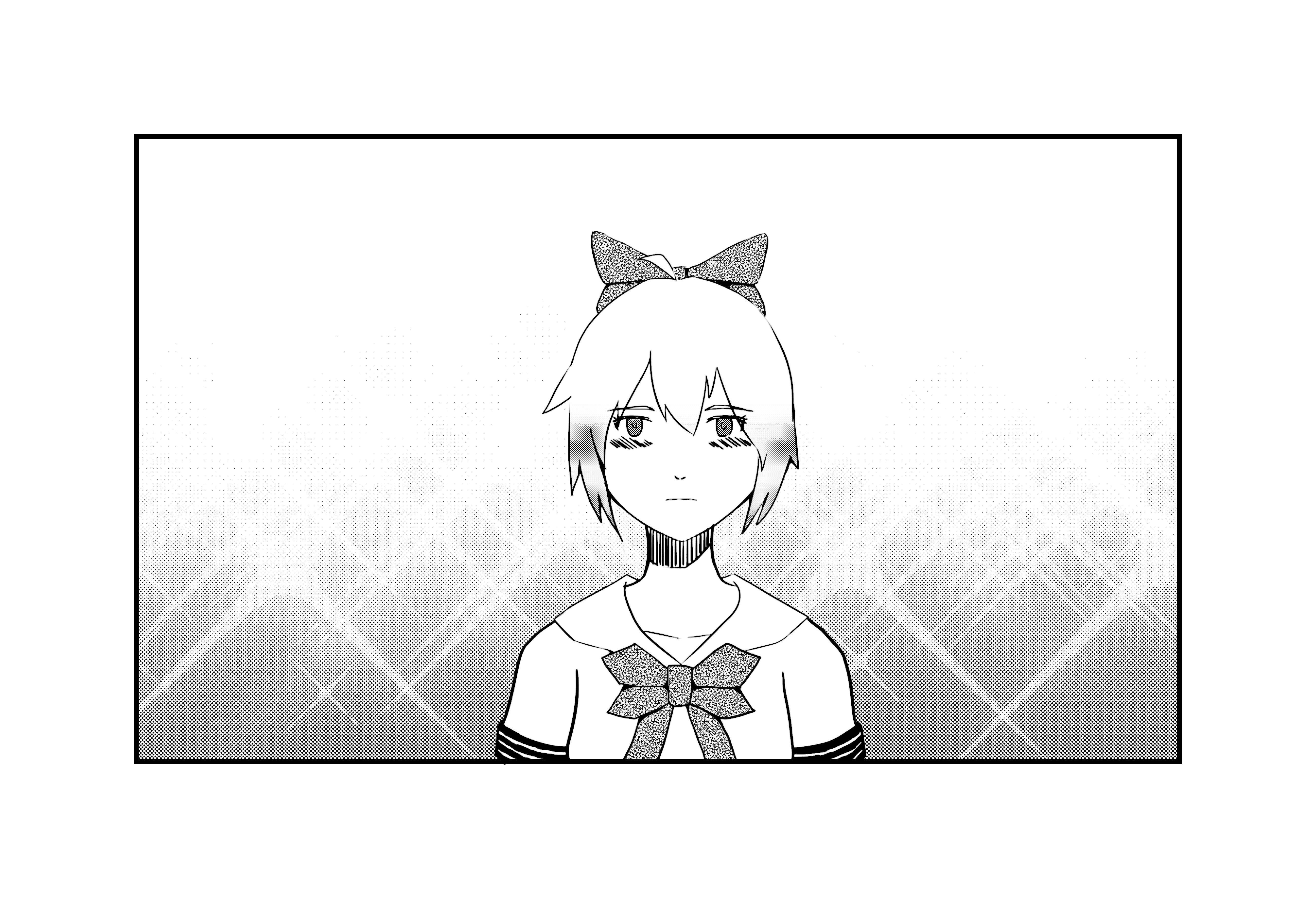 Un dibuix realitzat per mi per mostrar les funcions de les trames.